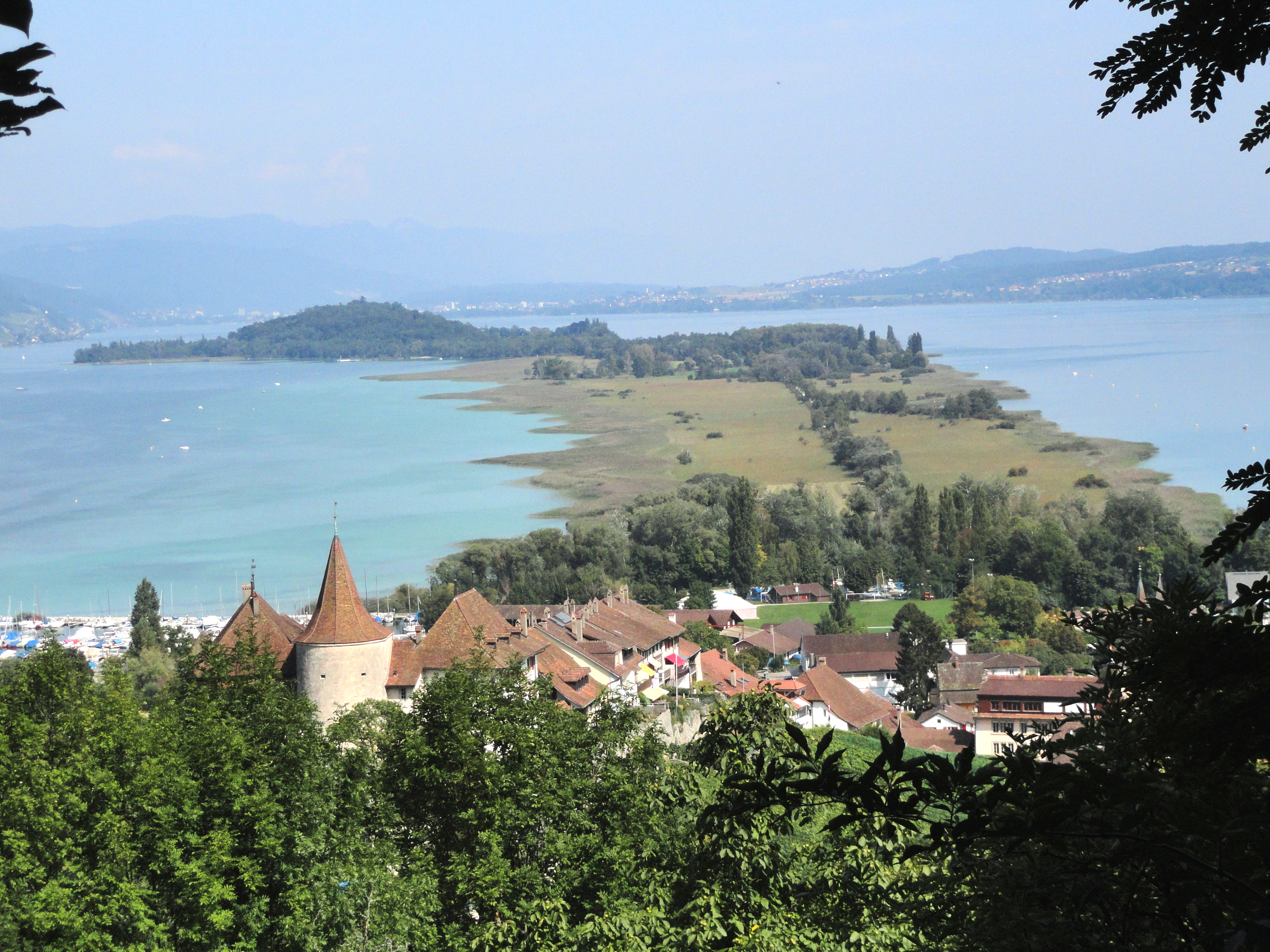 Heideweg und St.Petersinsel, aufgenommen oberhalb von Schloss Erlach, am Fusse des Jolimont.